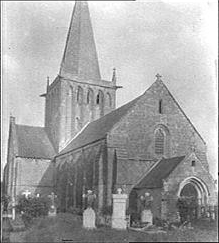 Église d'Appeville (Manche) - Extérieur, portail